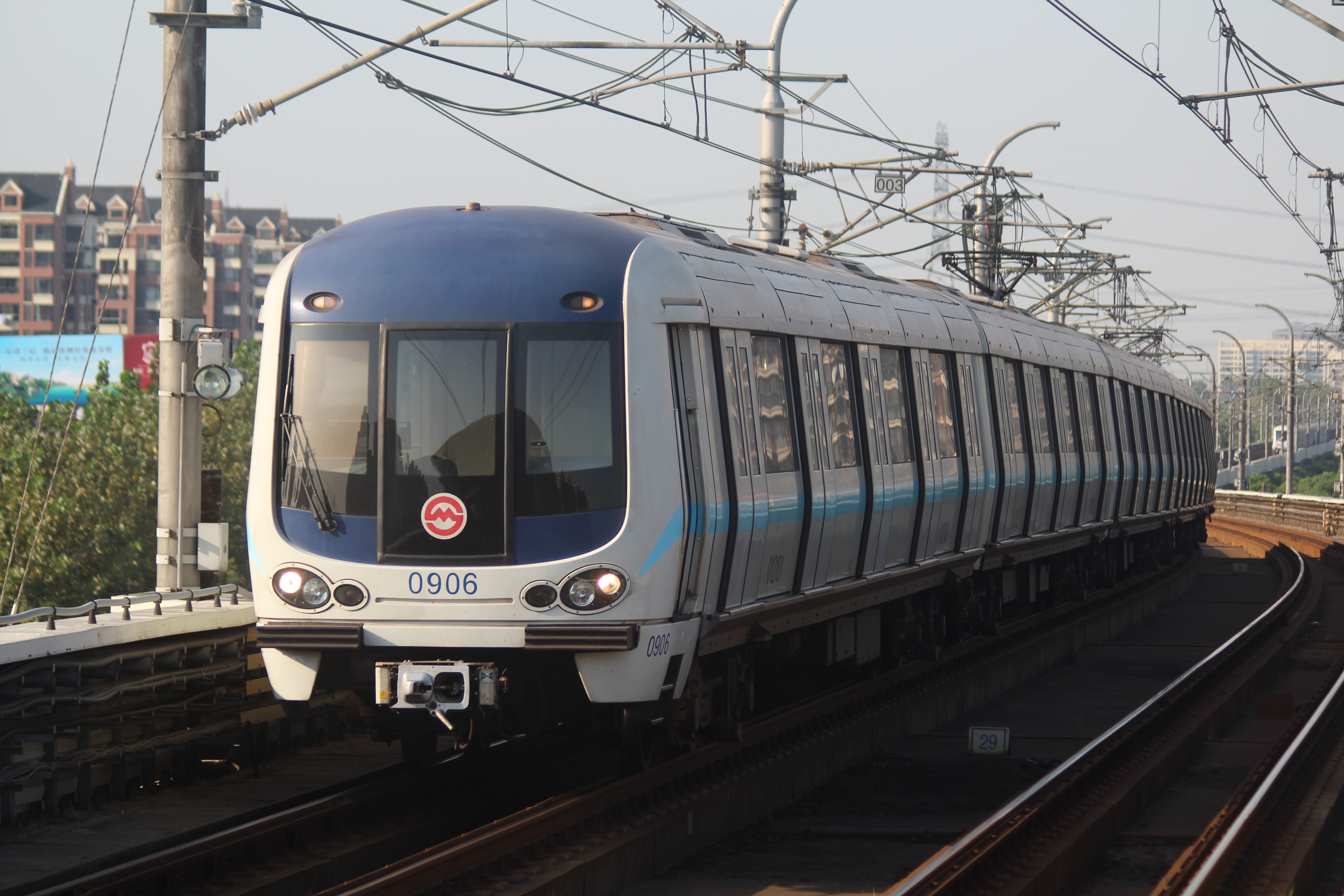 上海軌道交通９号線車両